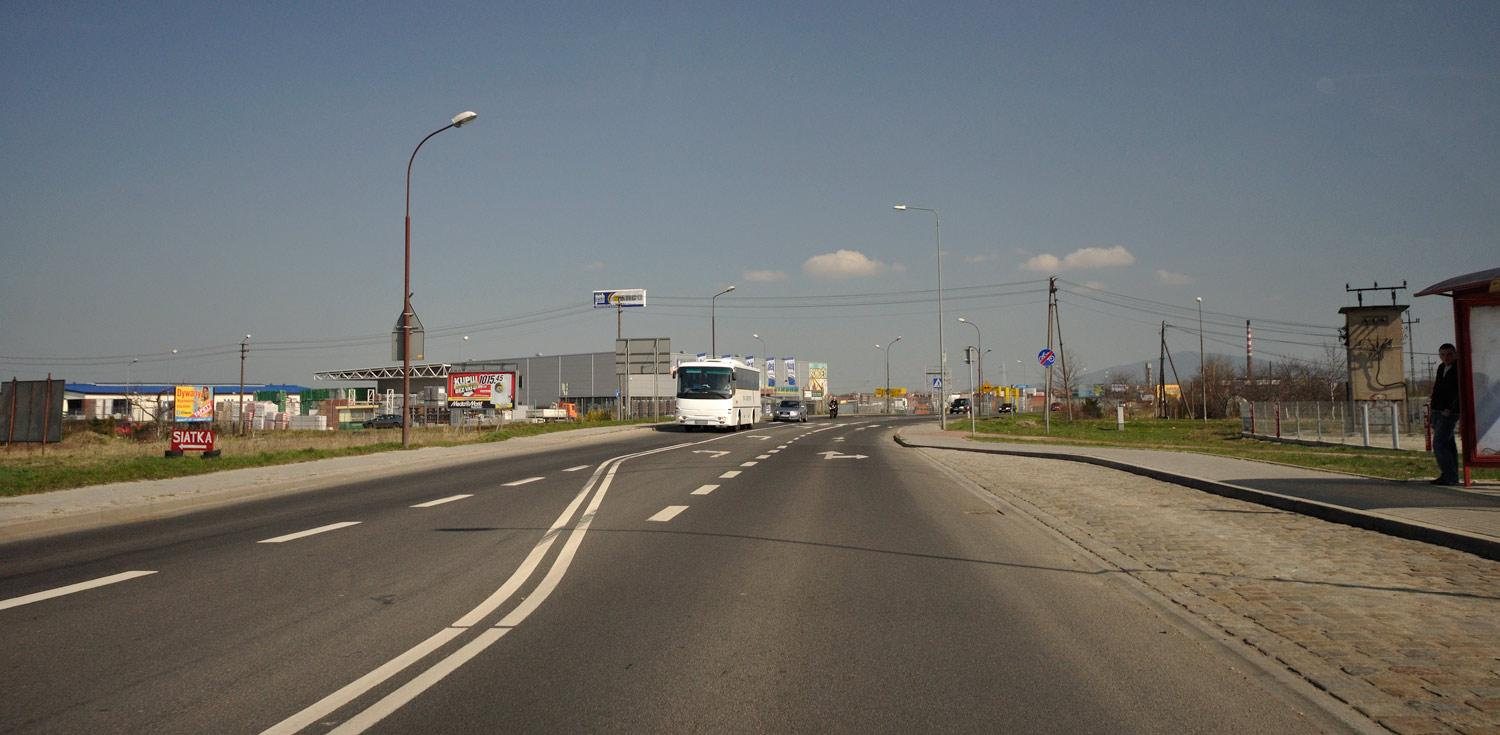 Ulica Szarych Szeregów czyli główna droga wjazdowa do Świdnicy. Widok w kierunku Pszenna.